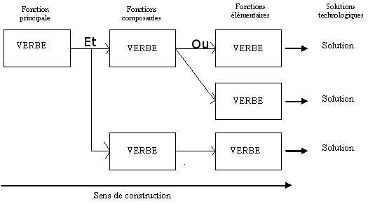 Petite illustration de la construction d'un diagramme Fast.